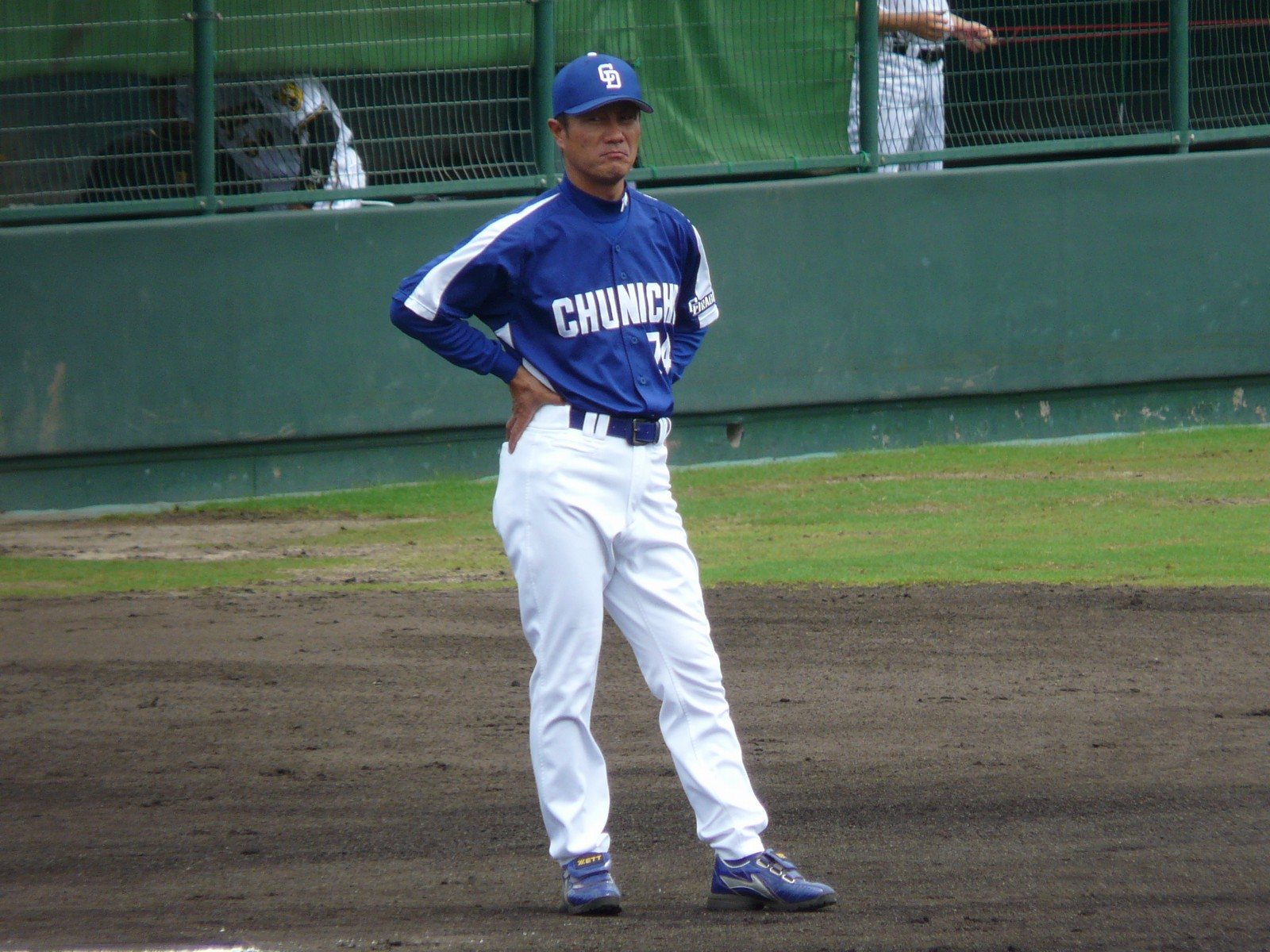 Copied from 画像:CD-Naoyuki-Kazaoka.jpg: "風岡尚幸"